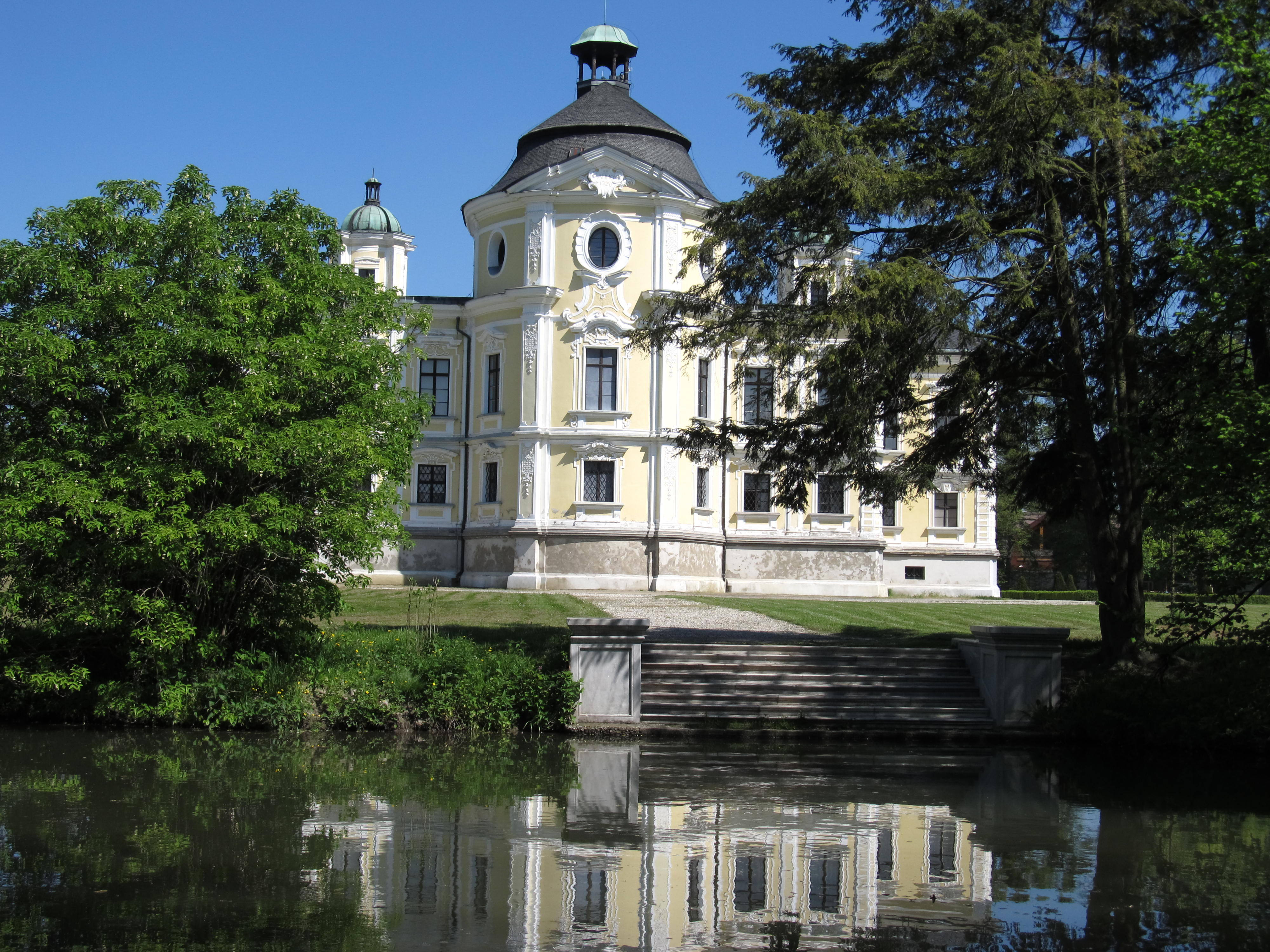 Zámek Kravaře, jižní průčelí